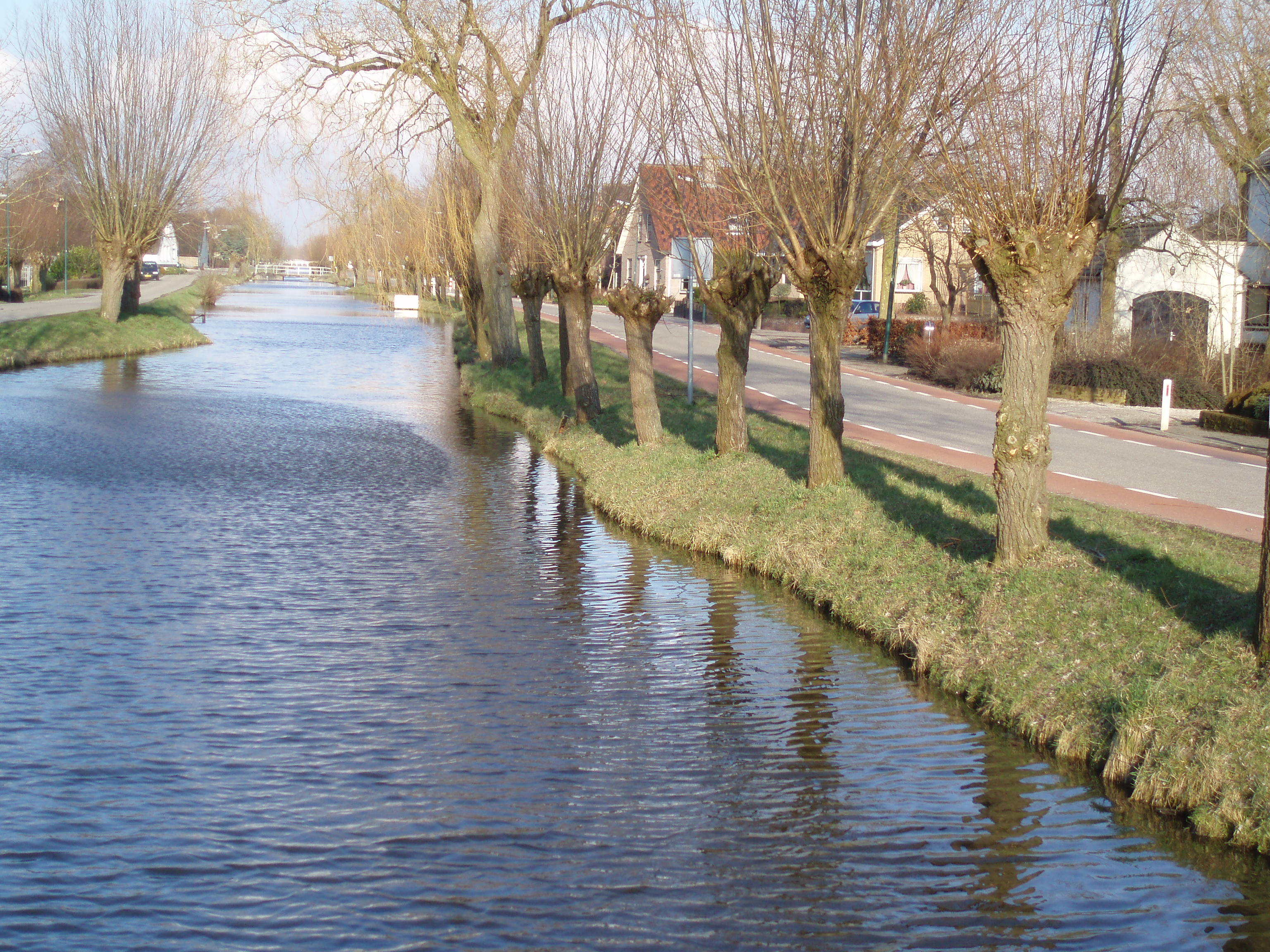 Polsbroek.